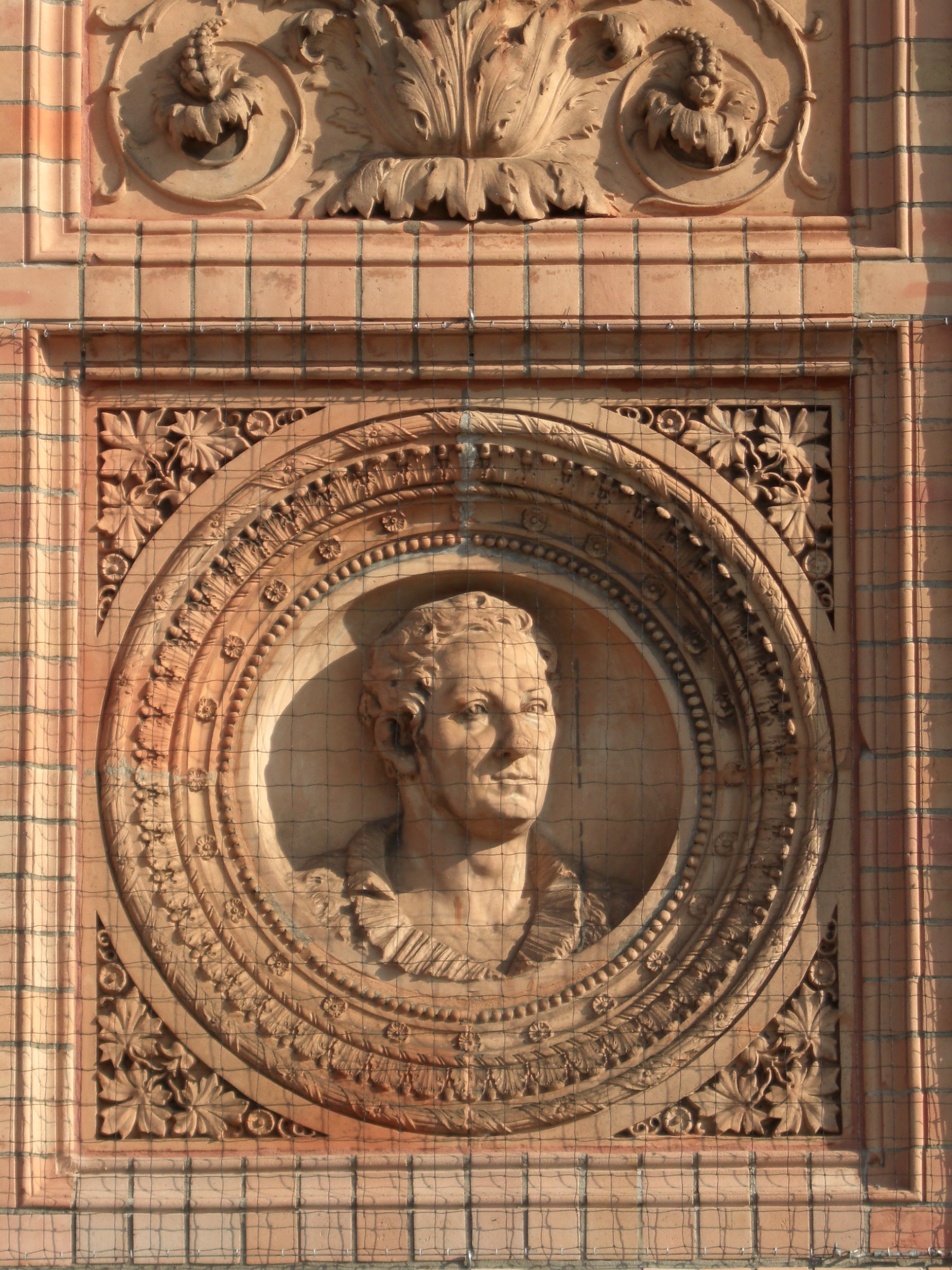 Balthasar Denner (1685-1749), Maler; Plastik an der Kunsthalle HamburgThis is a photograph of an architectural monument.